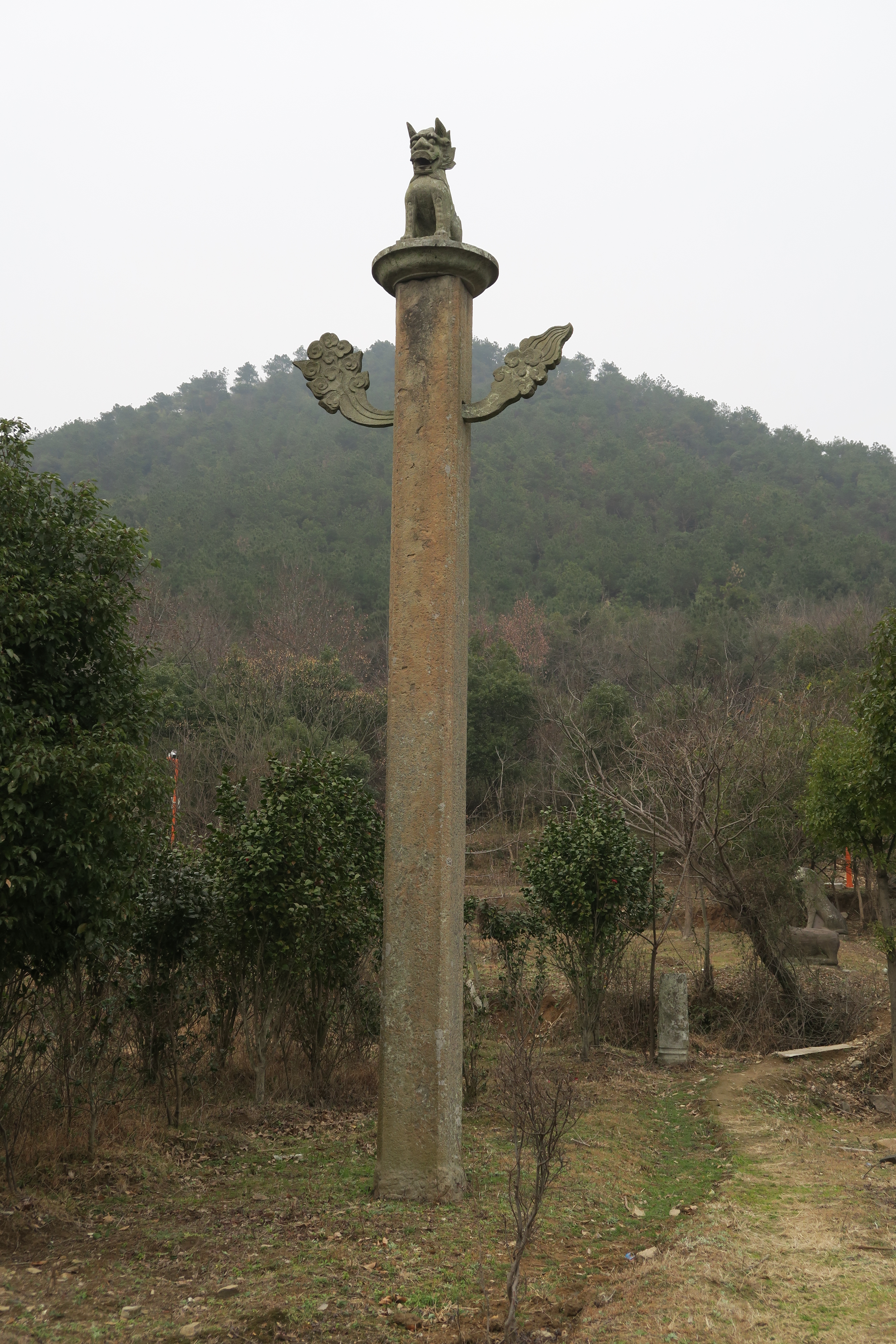 东钱湖墓群——余有丁墓道